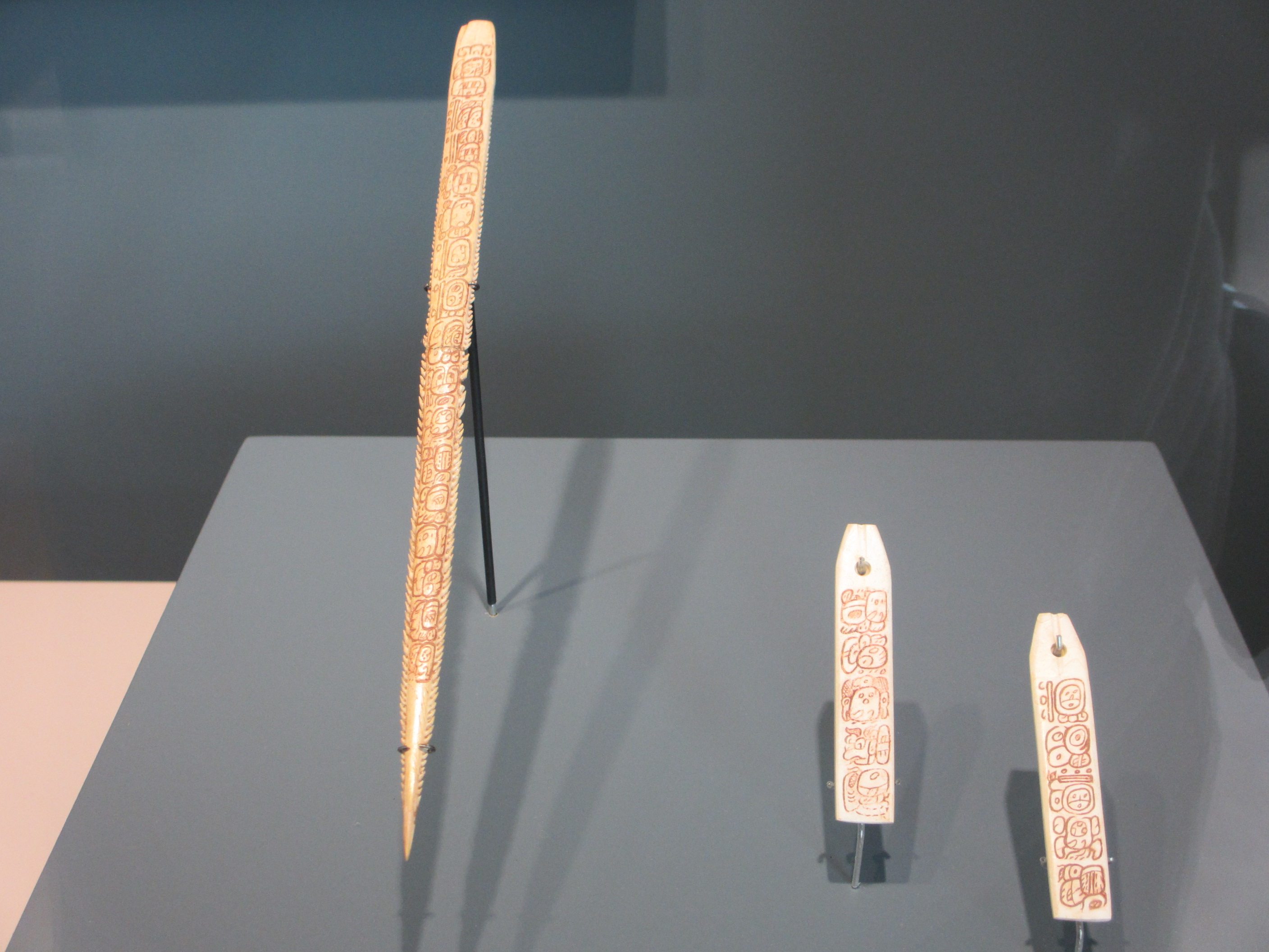 Punzón esgrafiado elaborado en la espina de mantarralla grabadas en el siglo VIII con jeroglíficos, descubiertas en el ajuar funerario del sacerdote (yajaw k´ahk´), (“señor de fuego”) Aj Pakal Tahn. El texto suma 260 jeroglíficos y relata 14 años de la vida de este sacerdote; esta ofrenda fue descubierta en 1998, en la fachada sur de los templos II y IIA de la Plaza Norte de la zona arqueológica, junto con otras 24 espinas, también con inscripciones, y otros objetos de carácter ritual. Zona arqueológica de Comalcalco, Tabasco, México.